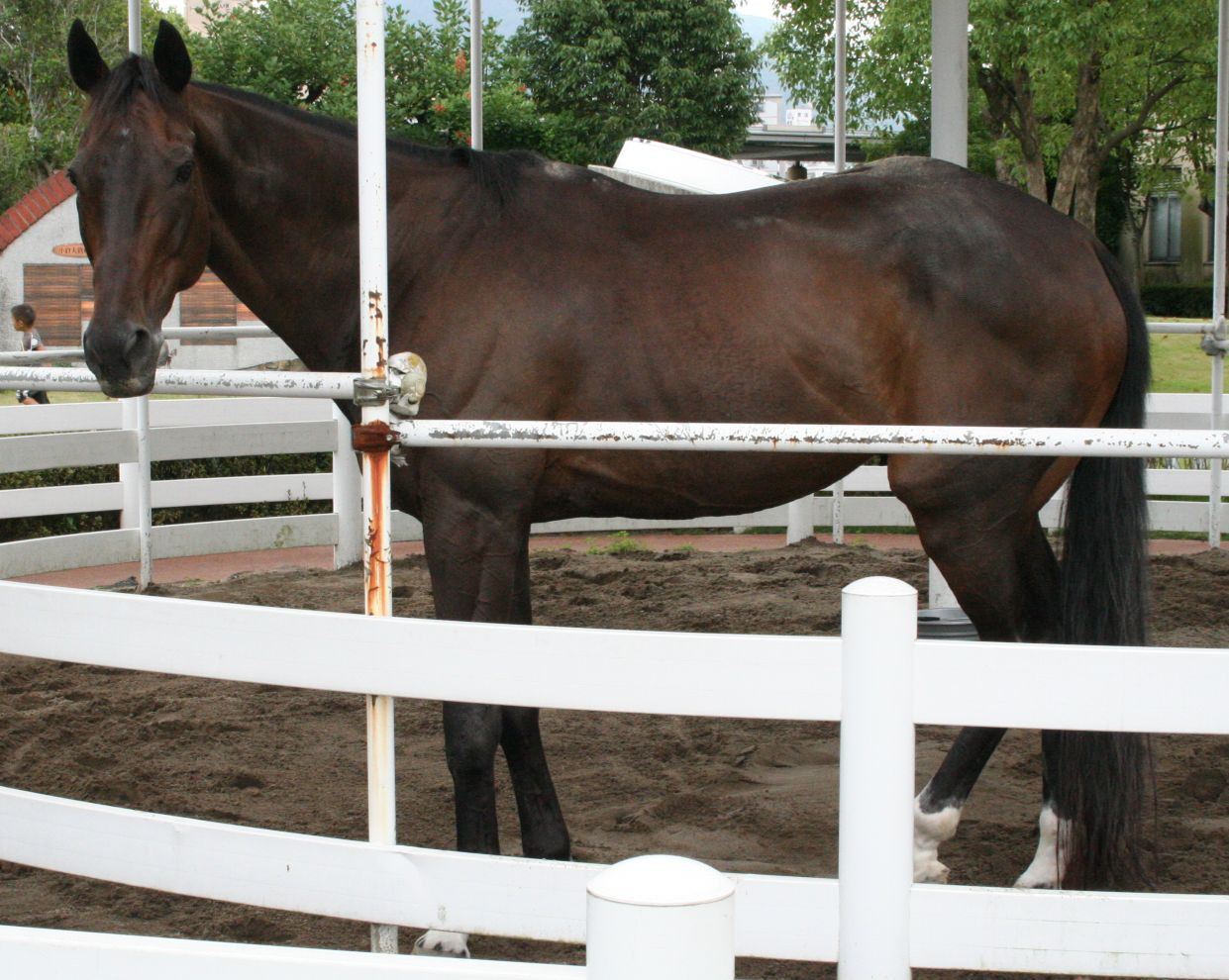 テイエムオオアラシ（小倉競馬場）